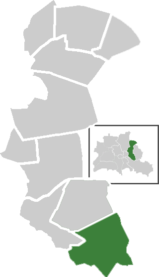 Lage des Ortsteil Karlshorst im Berliner Bezirk Lichtenberg